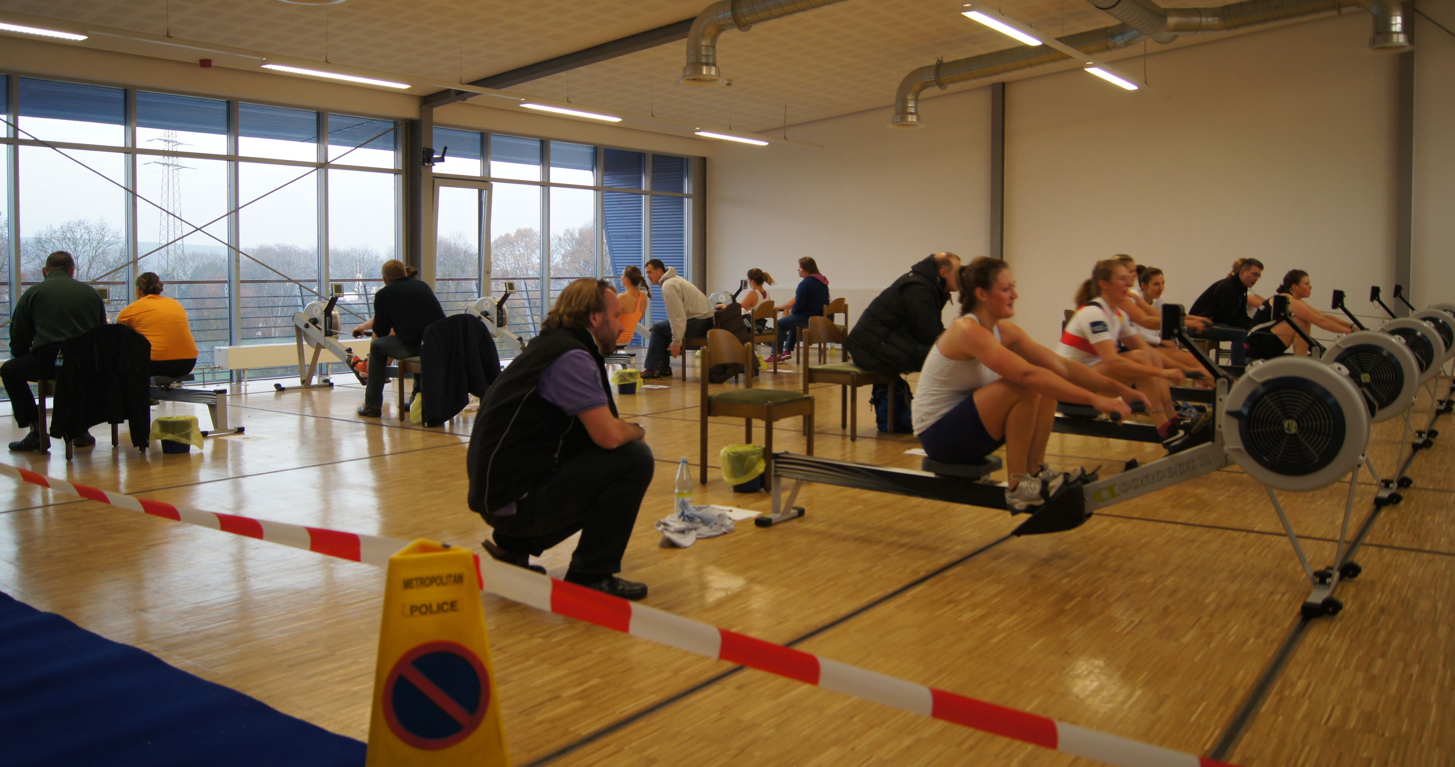 Bundesleistungszentrum Ergometerraum (2014)